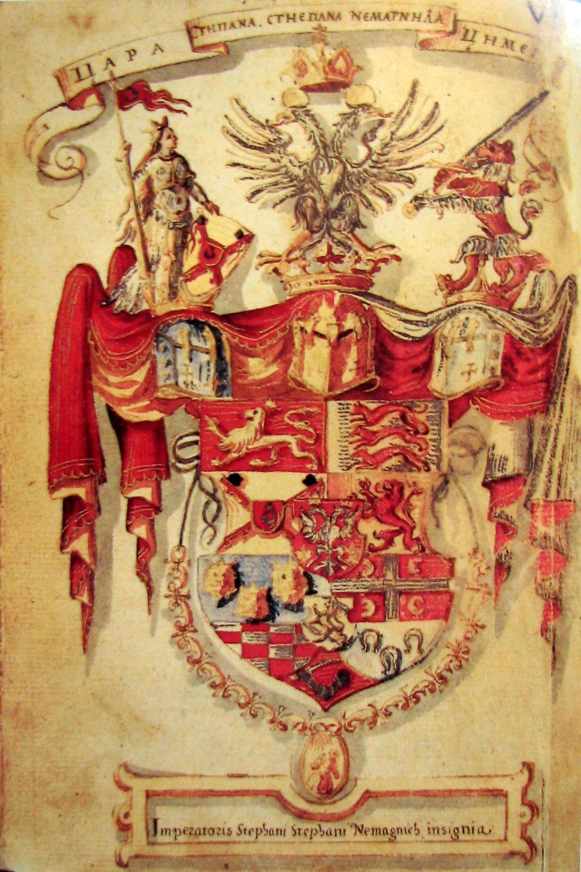 Грб Српског царства према Коренић–Неорић грбовнику